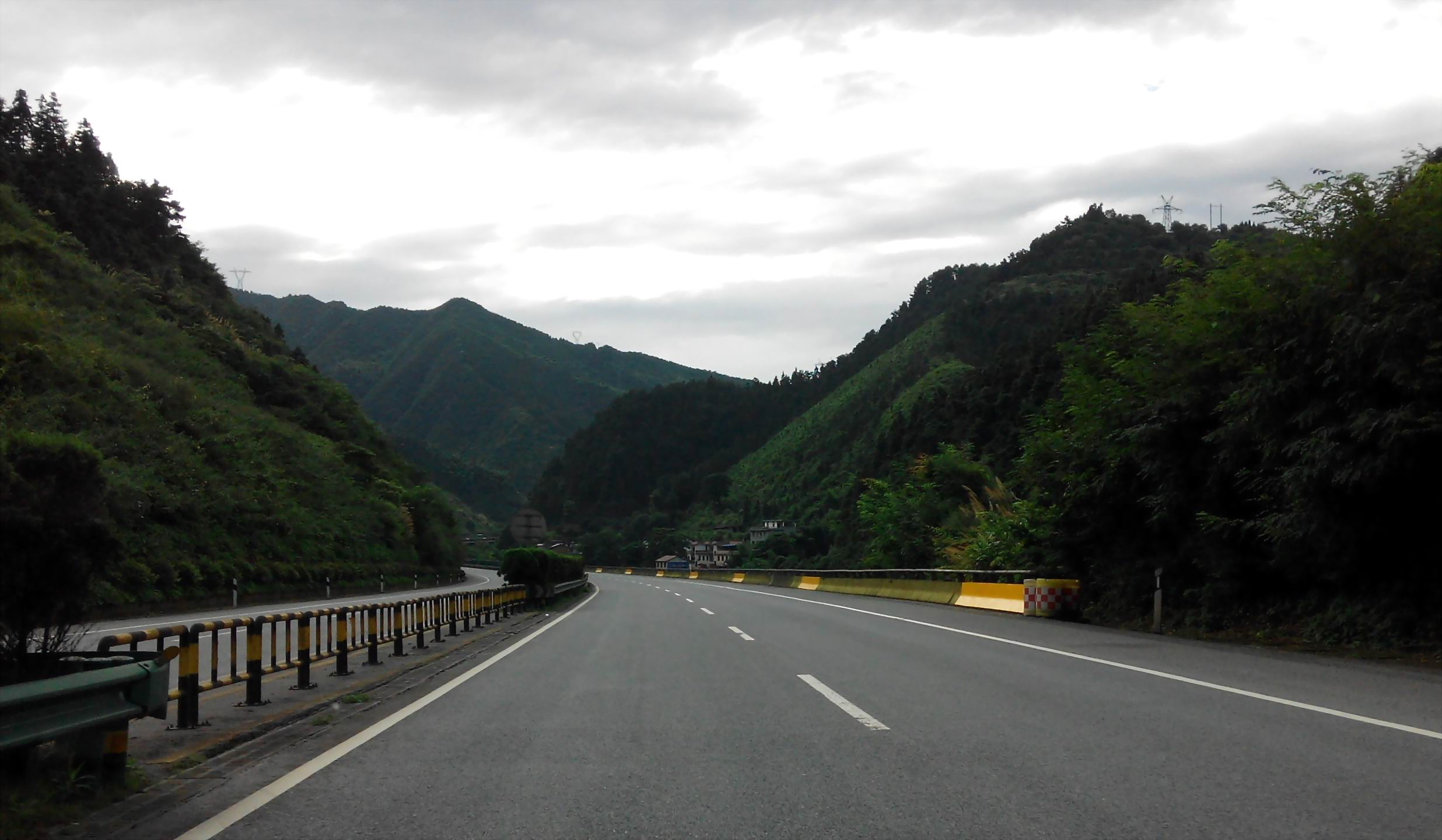 中国高速G60 昆明方向 近邵阳市洞口镇